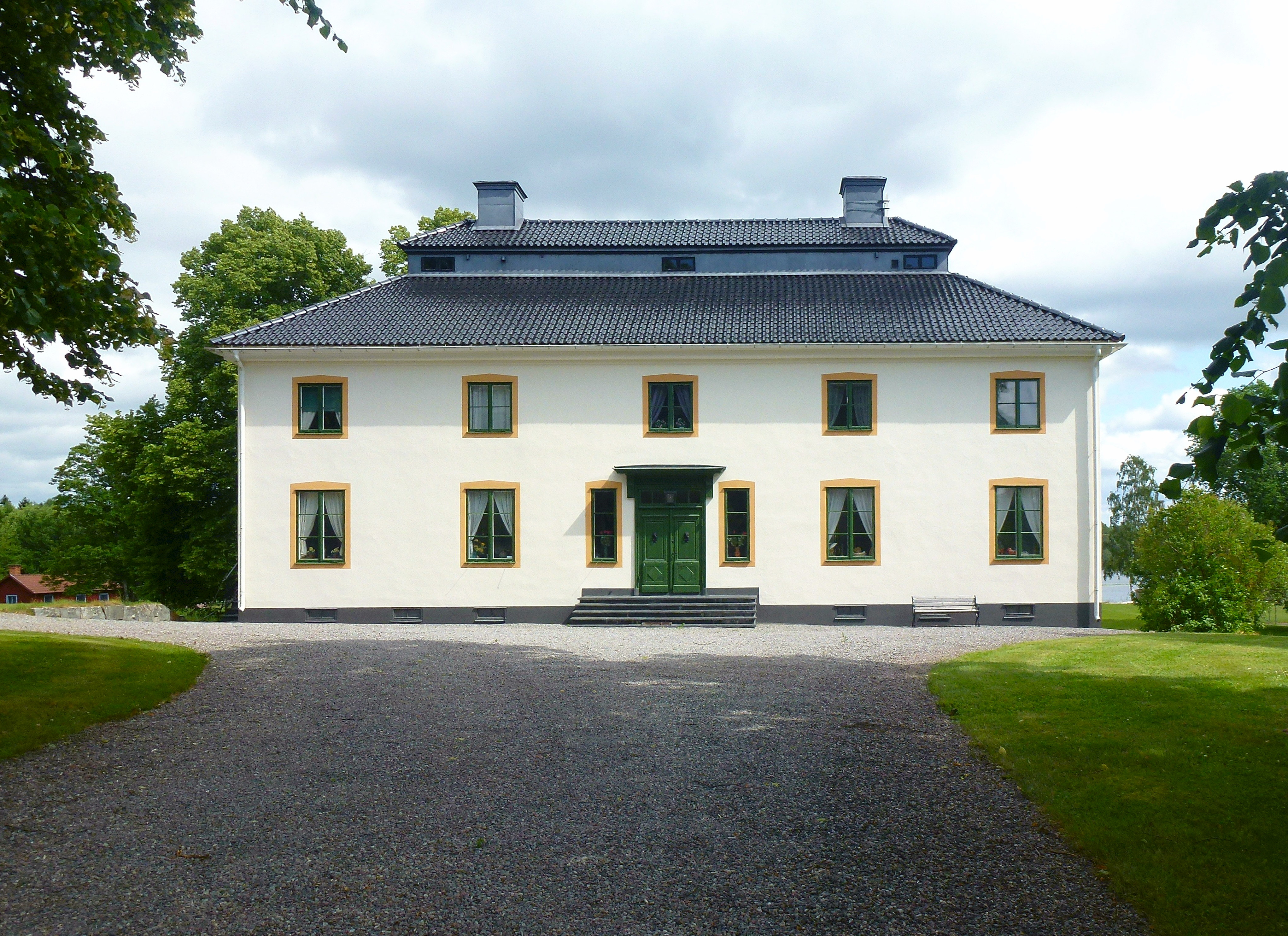 Molnsätra gård, huvudbyggnad, arkitekt Wolter Gahn